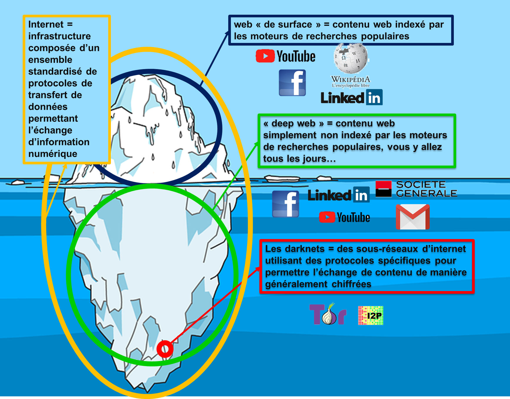 Il s'agit d'une image d'iceberg proposant une vision équilibré et reflétant l'état actuel des choses quant au web, deepweb, darknets et l'infrastructure internet. avec des définitions.